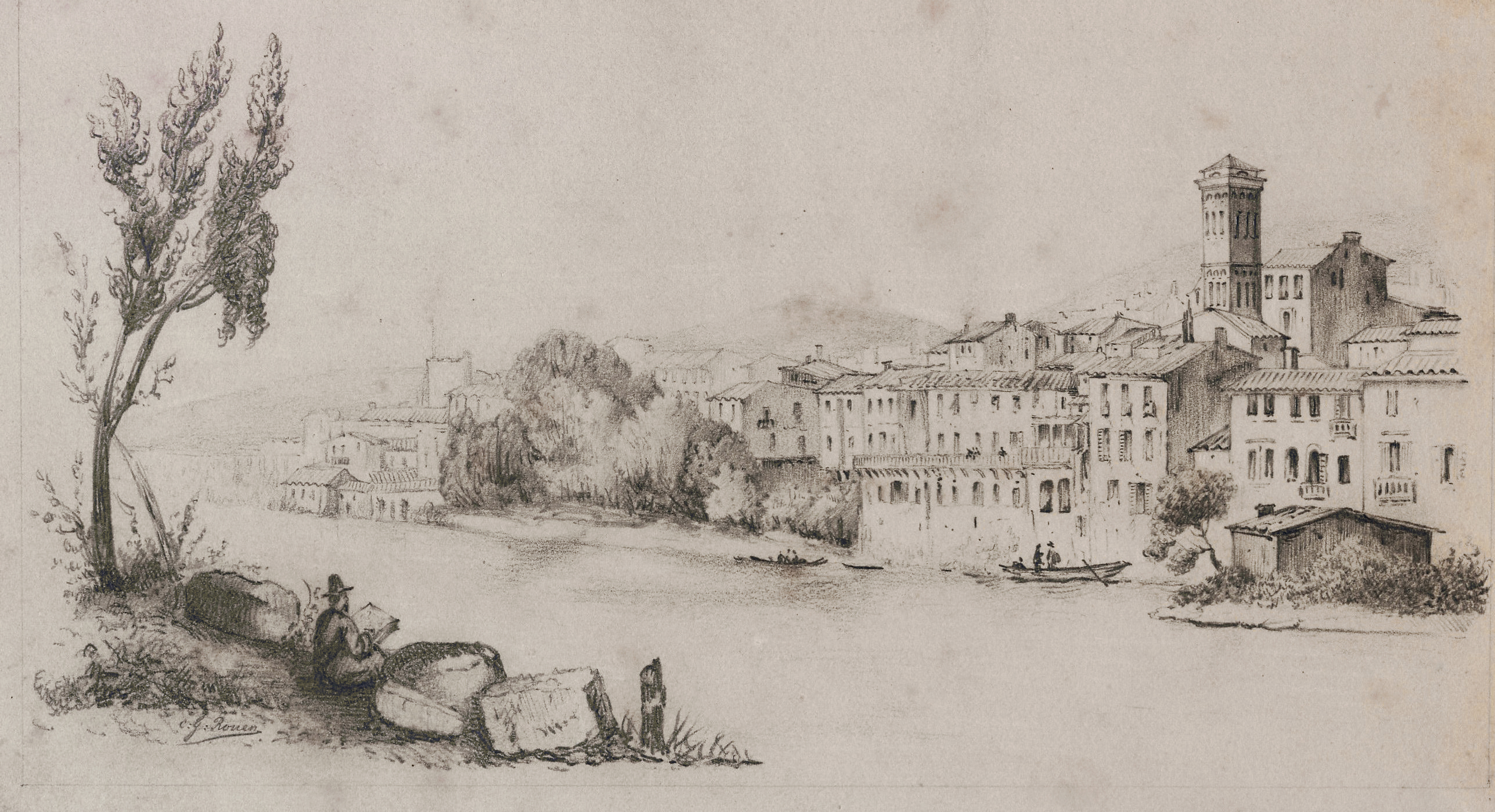 Vue d'une ville italienne (Orta San Giulio) par le général Charles ROUEN.